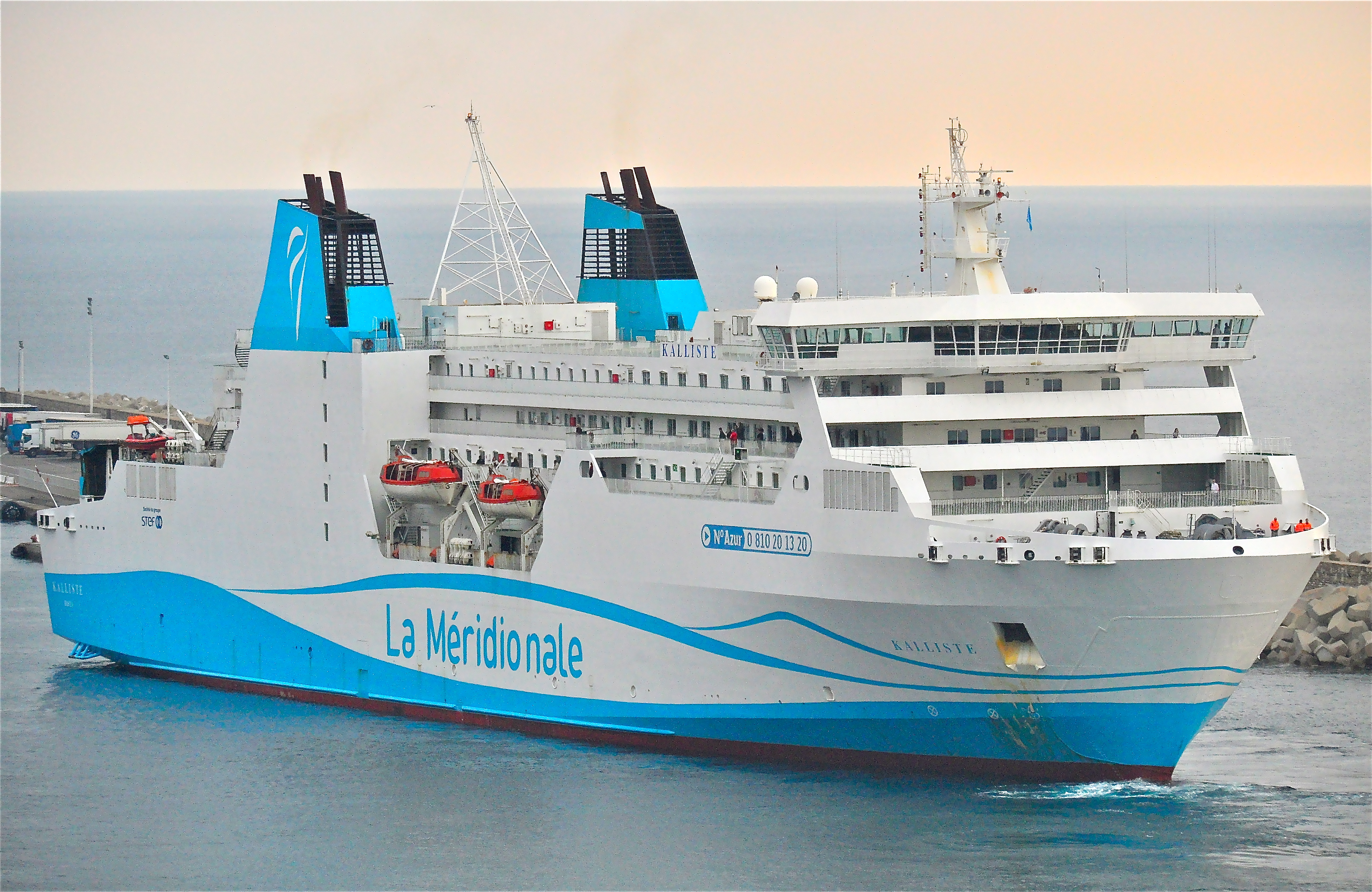 Le Kalliste, cargo mixte de la compagnie La Méridionale lors d'une arrivée à Bastia.